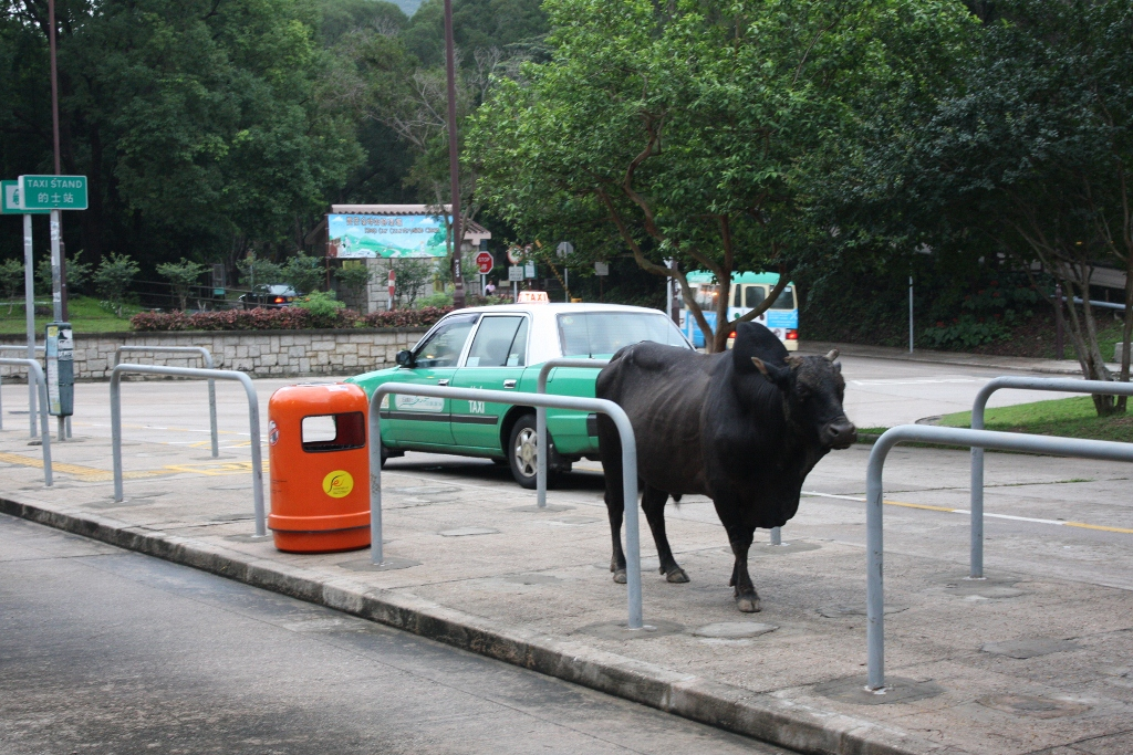 Pak Tam Chung Taxi Queue